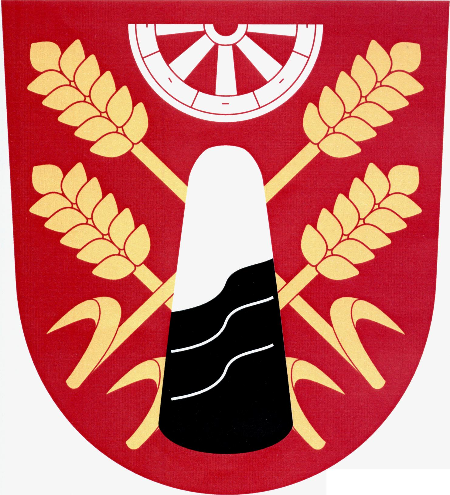 Znak obce Úžice (okres Mělník)